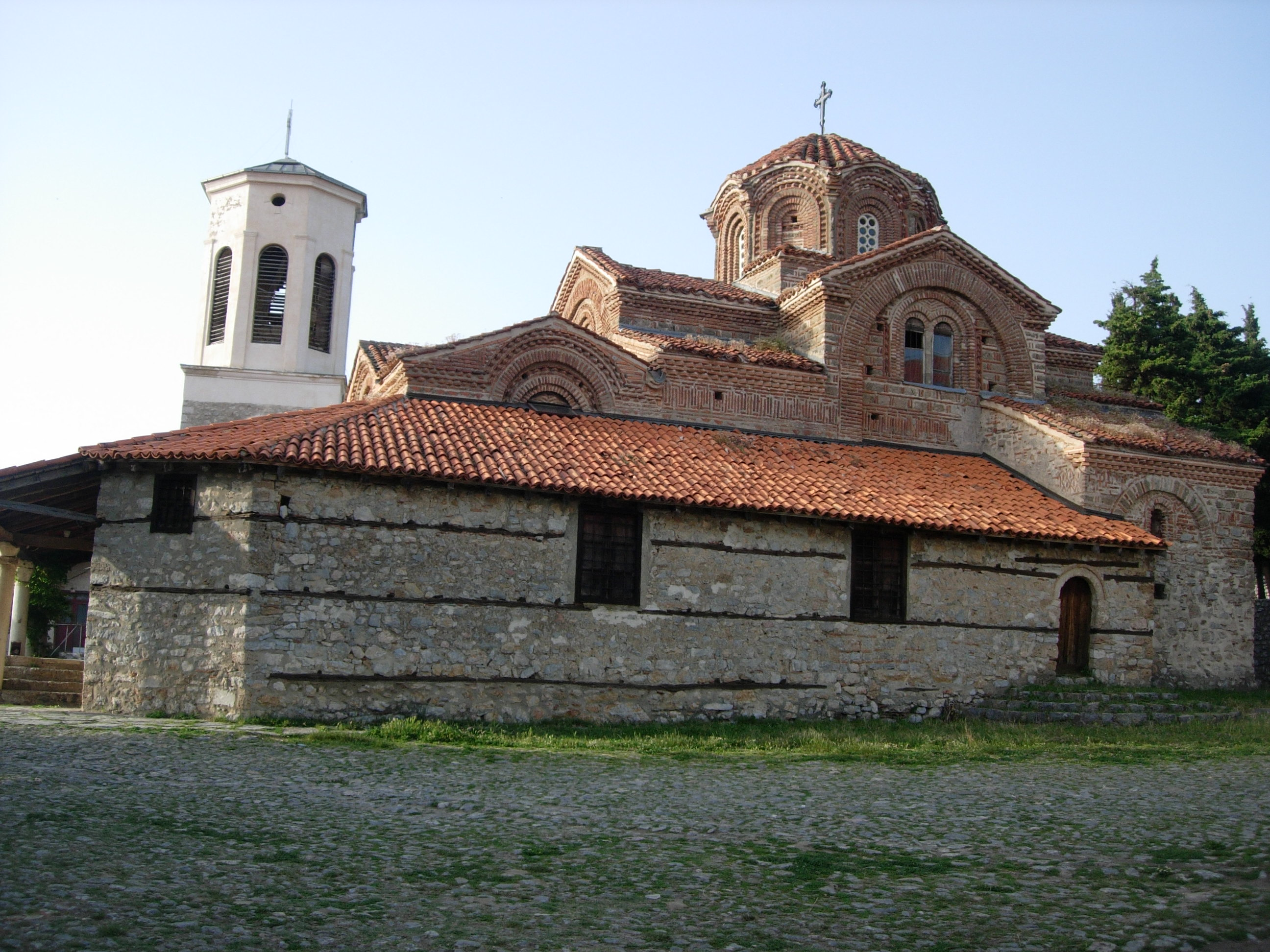 Света Богородица Перивлепта (Свети Климент), Охрид, Република Македония.